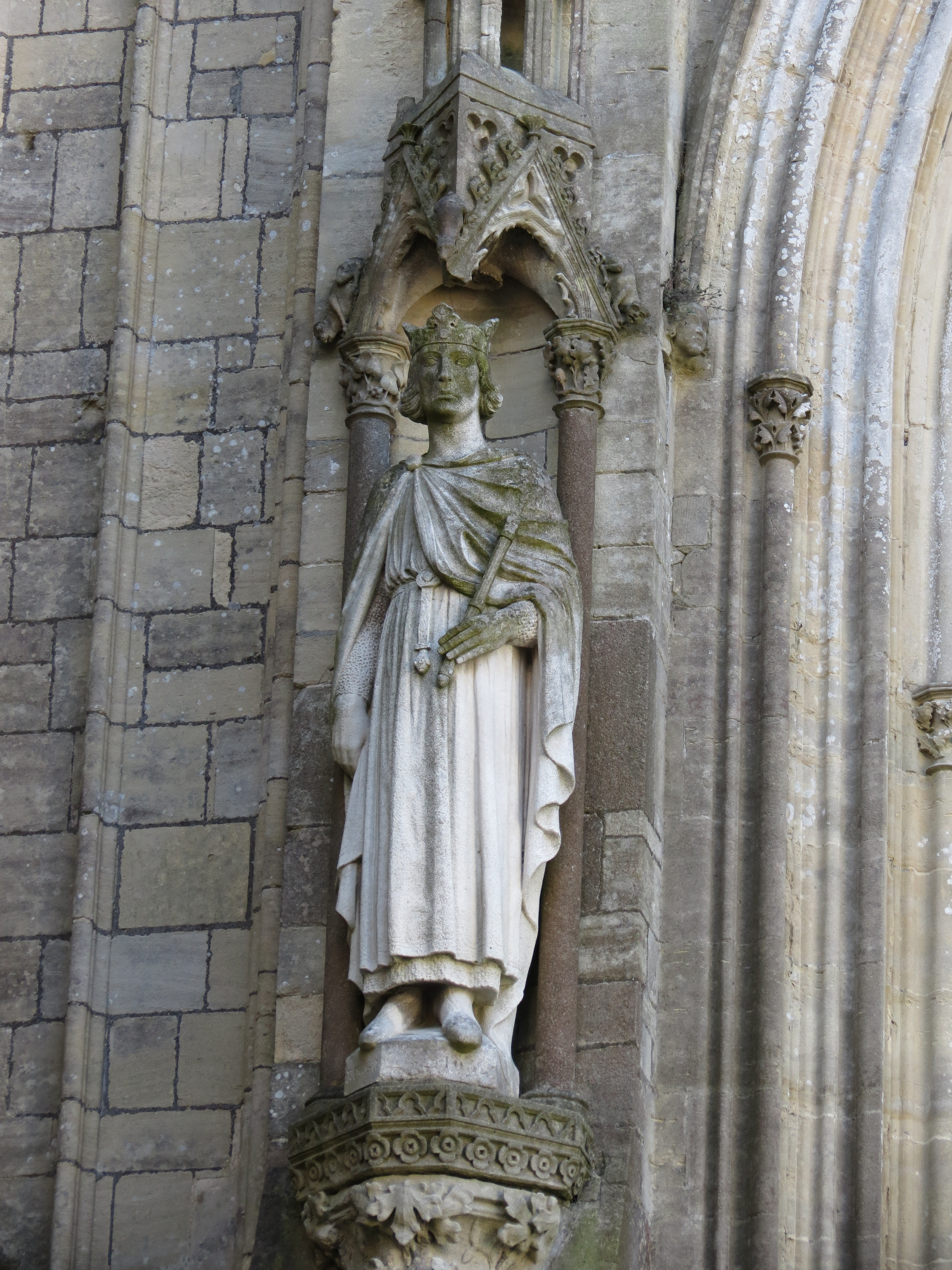 Statue de Roger Ier de Sicile datant de 1875, remplaçant celle abîmée à la Révolution.